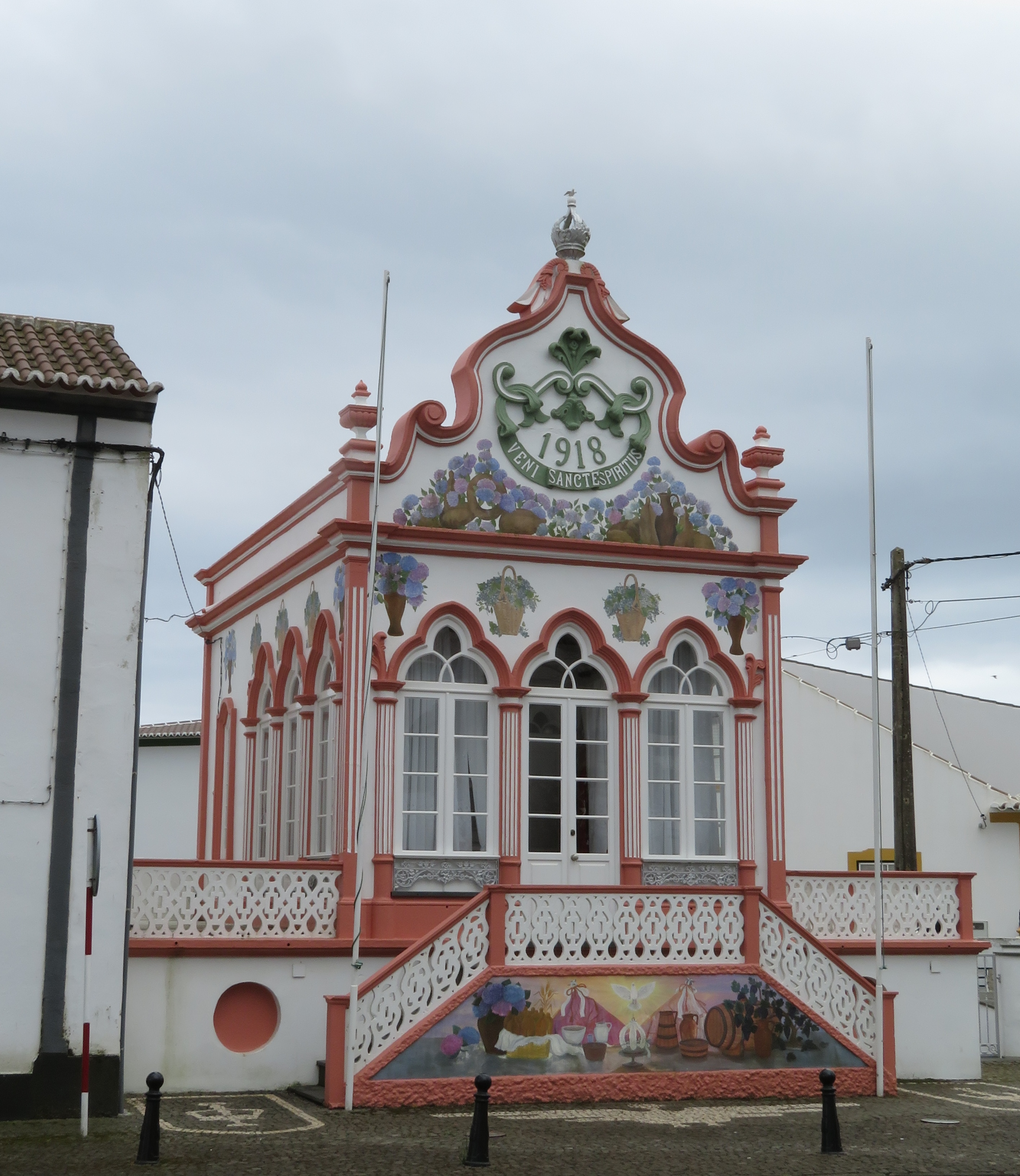 Heilig-Geist-Kapelle in São Sebastião, Insel Terceira, Azoren, Portugal